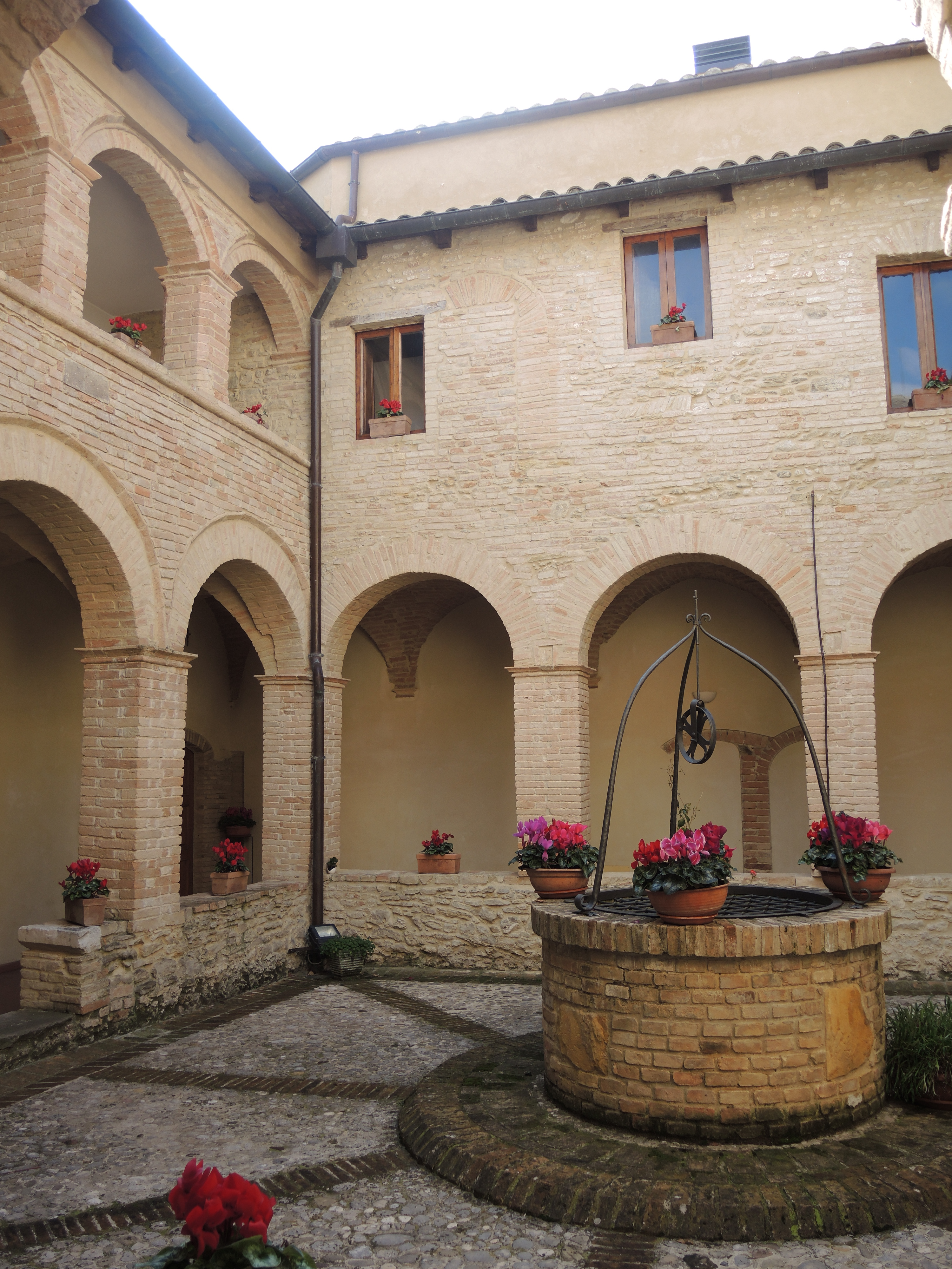 Orsogna: Convento della Santissima Annunziata